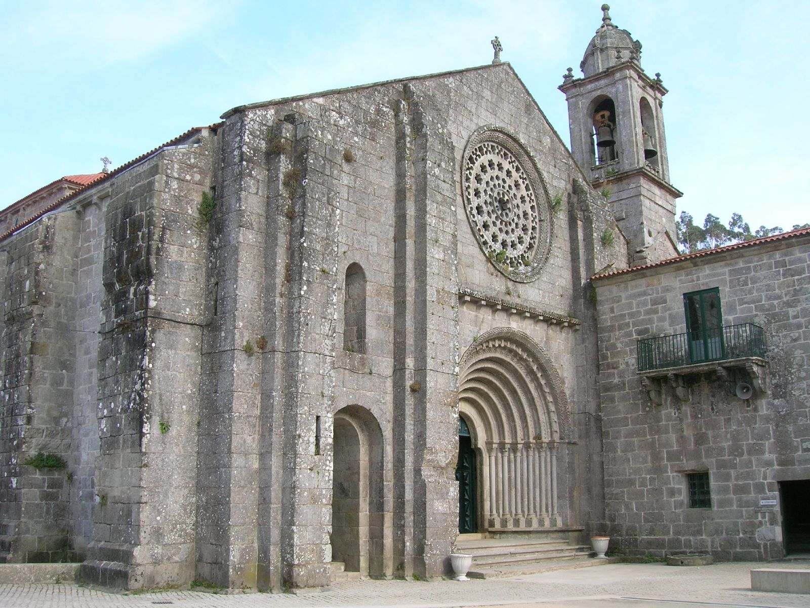 Mosteiro de Santa Santa María de Armenteira, Galicia - Spain'Monasterio de Santa María de Armenteira'